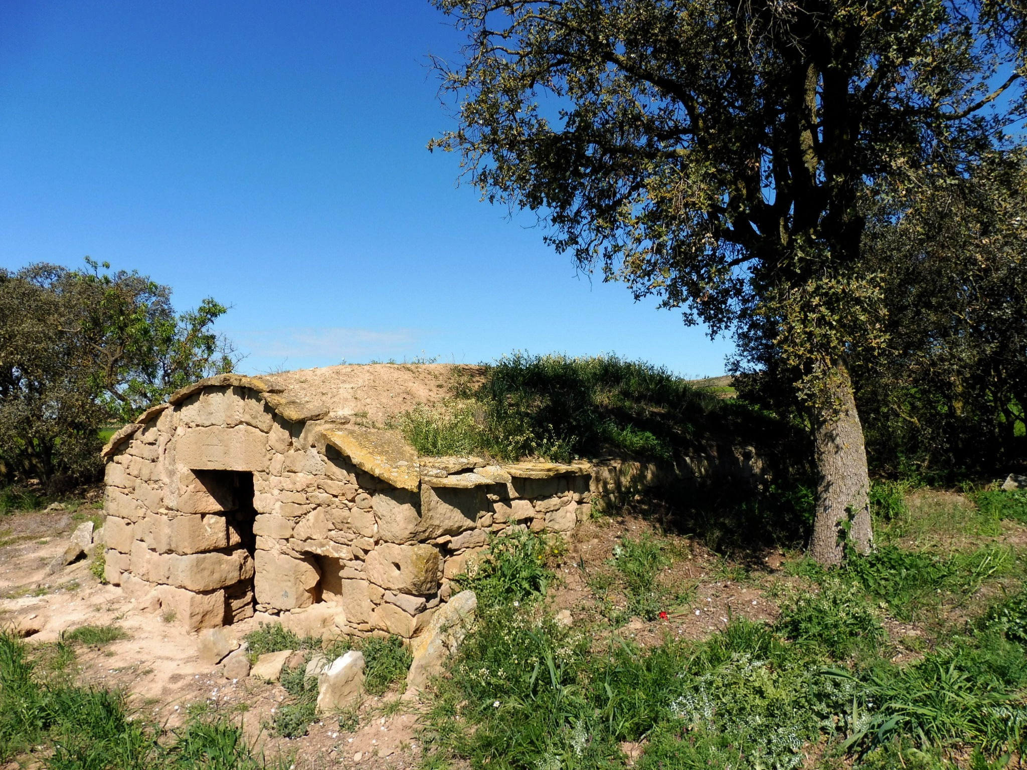 Cabanes de Volta I de Concabella (els Plans de Sió)